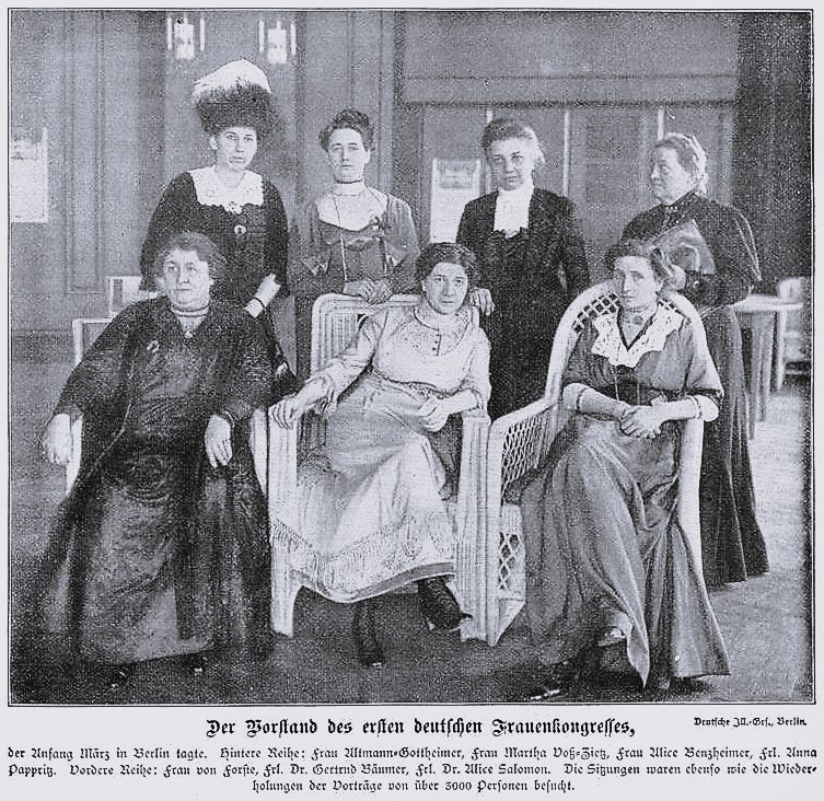 Vorstand des ersten deutschen Frauenkongress Anfang März 1912 in Berlin, Foto Deutsche Ill.-Ges., Berlin.Hintere Reihe: Frau Altmann-Gottheiner, Frau Martha Voss-Zietz, Frau Alice Benzheimer, Frl. Anna PappritzVordere Reihe: Frau von Forster, Frl. Dr. Gertrud Bäumer, Frl. Dr. Alice Salomon.